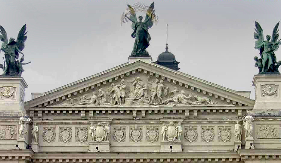 Tympanon Teatru Wielkiego we Lwowie - fotografia wykonana we wrzesniu 2003. Autor: Stanisław Kosiedowski